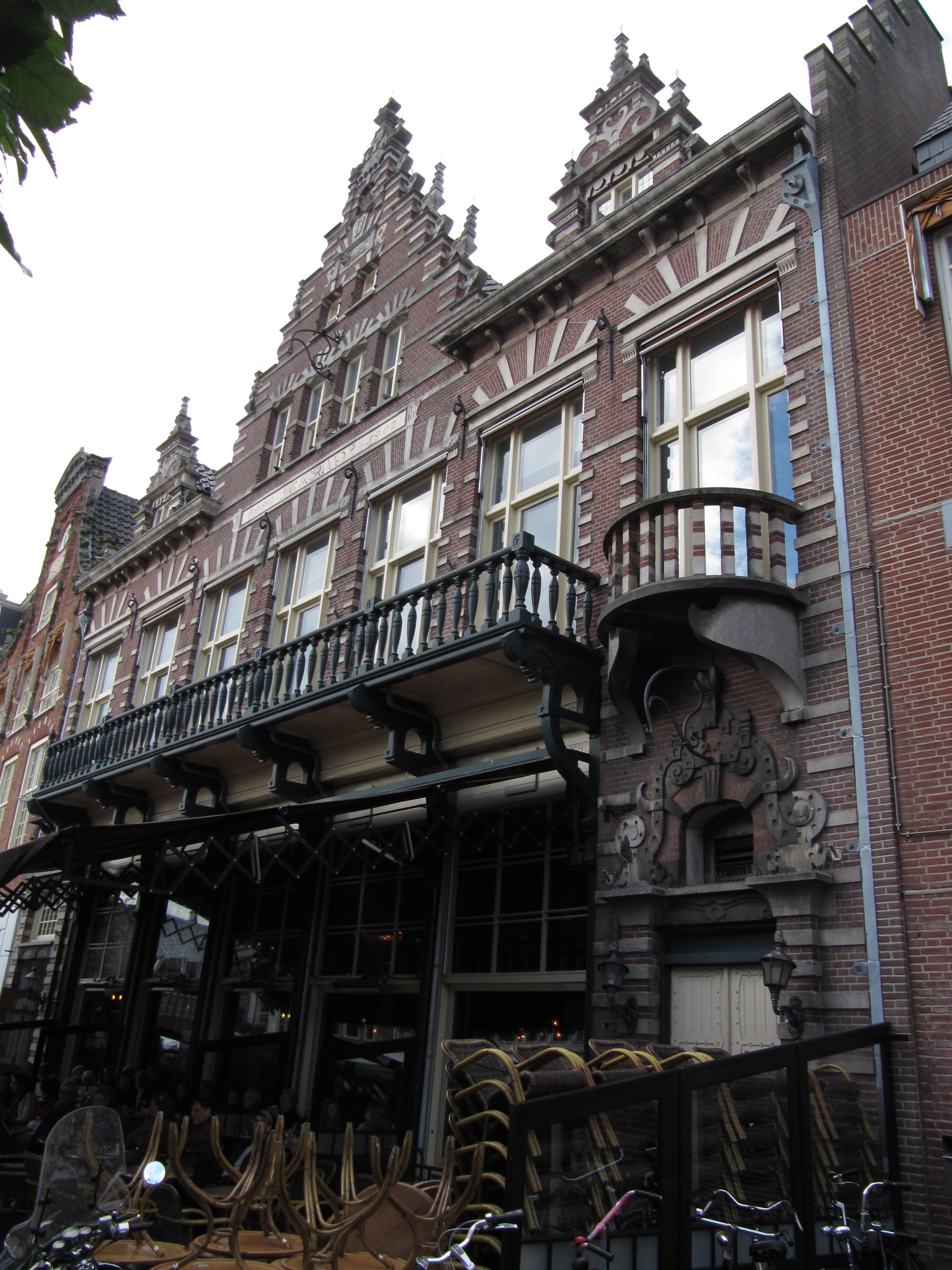 RM513376 Haarlem - Grote Markt 13.jpg